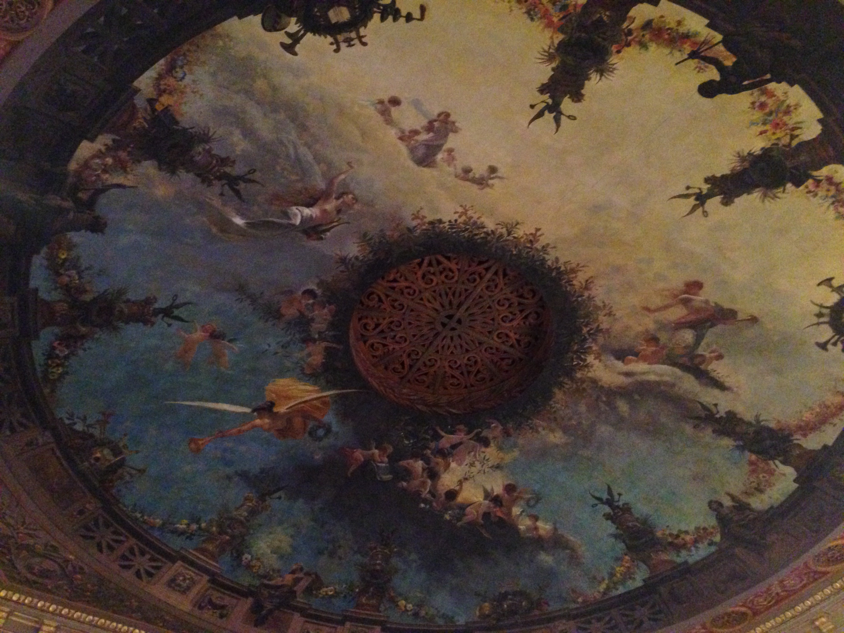 Dipinto soffitto teatro